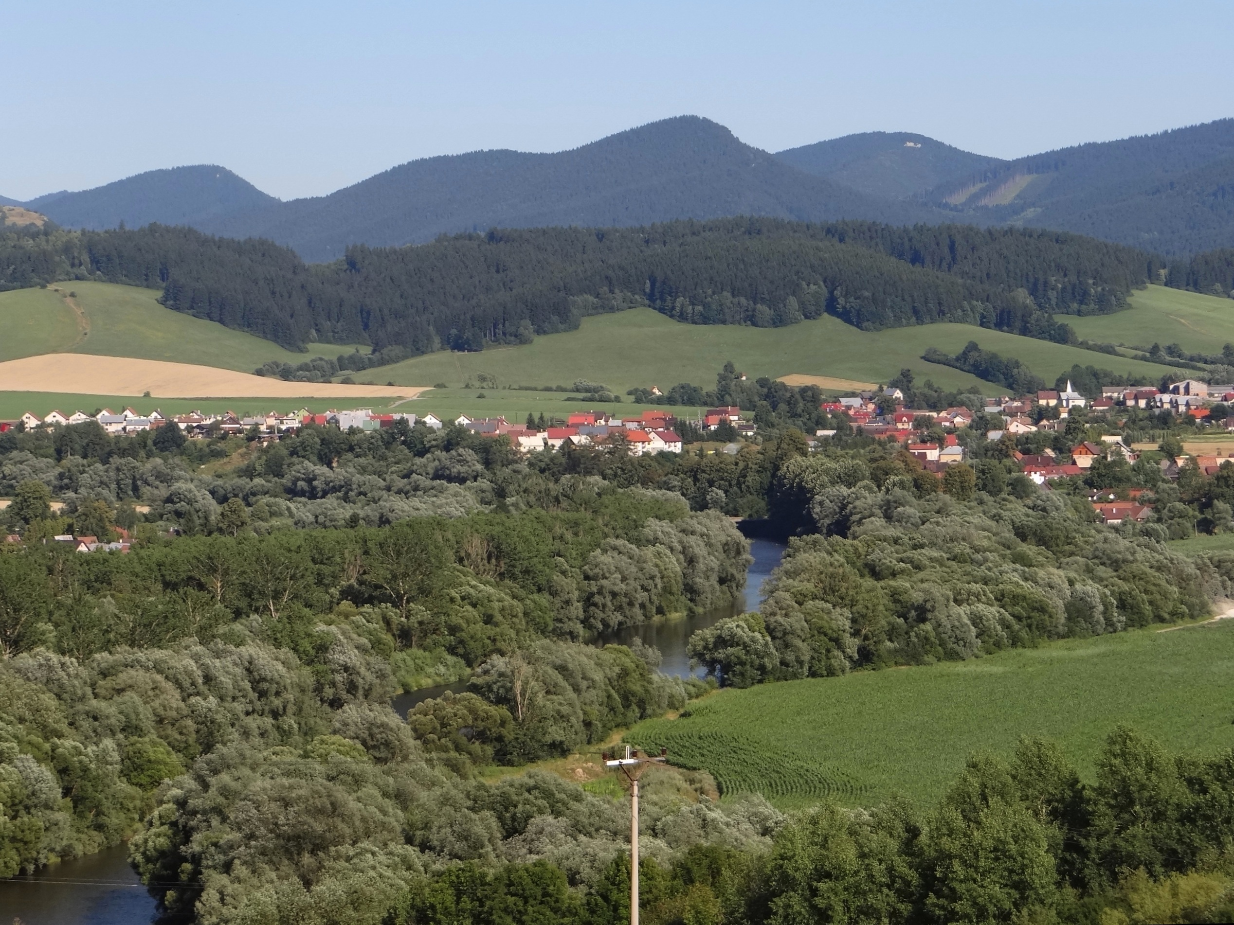 Veličná, Chočské vrchy